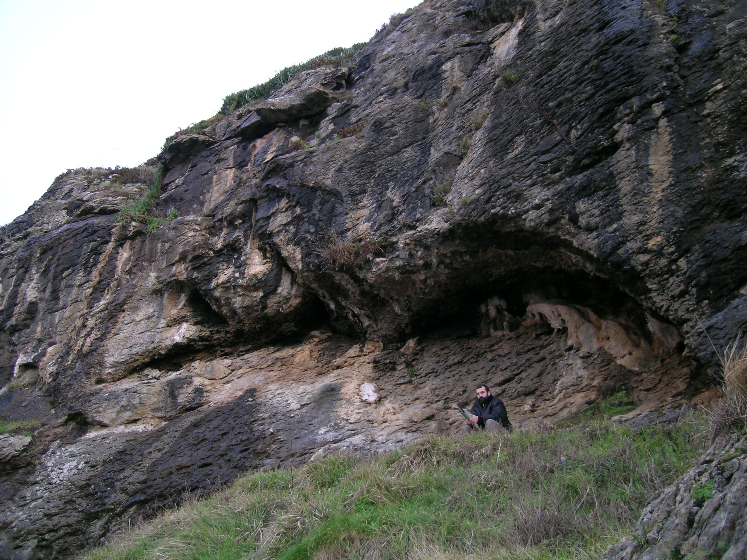 Antzoriz II kobazuloa (Lekeitio).